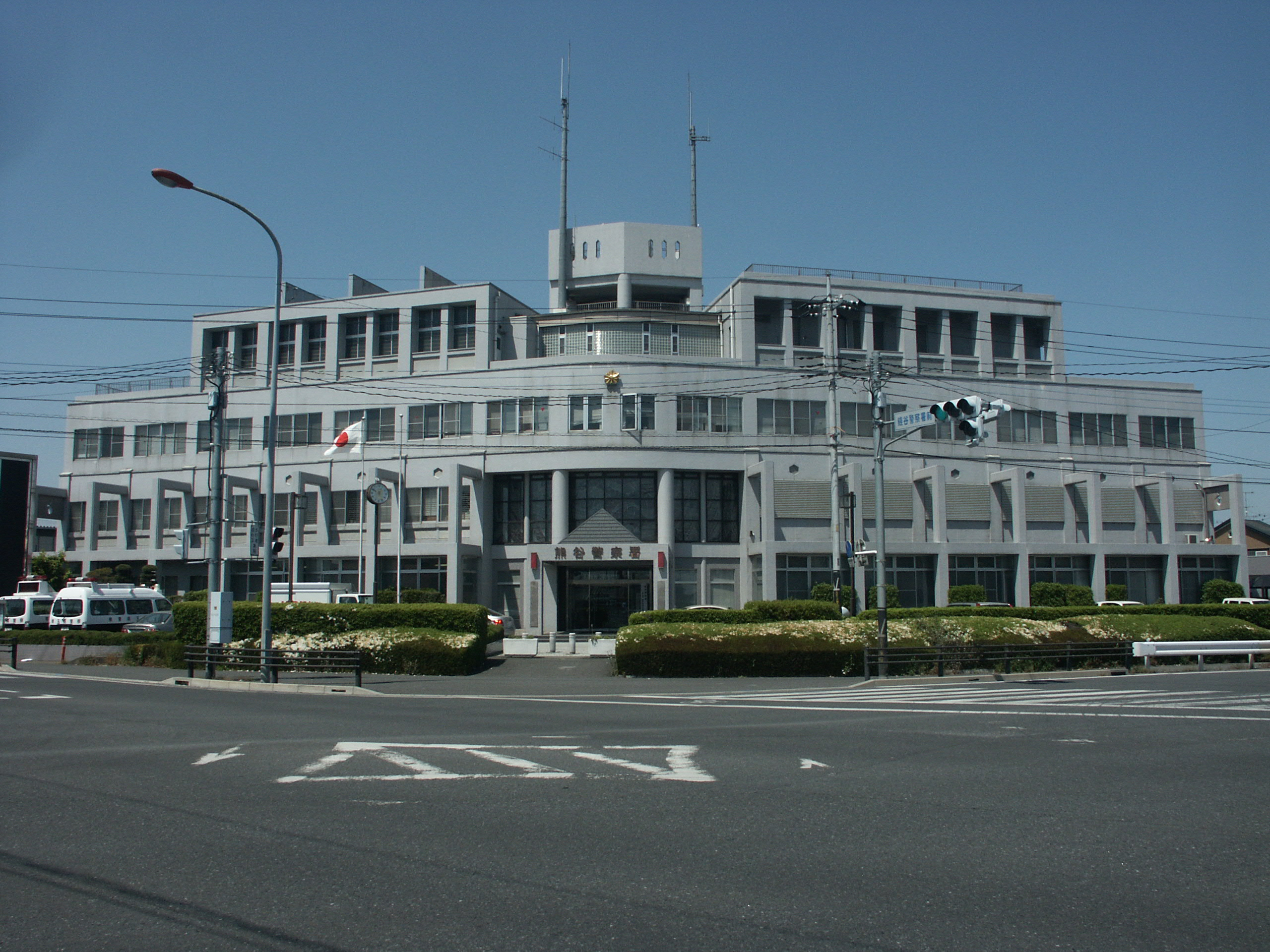 埼玉県熊谷警察署庁舎